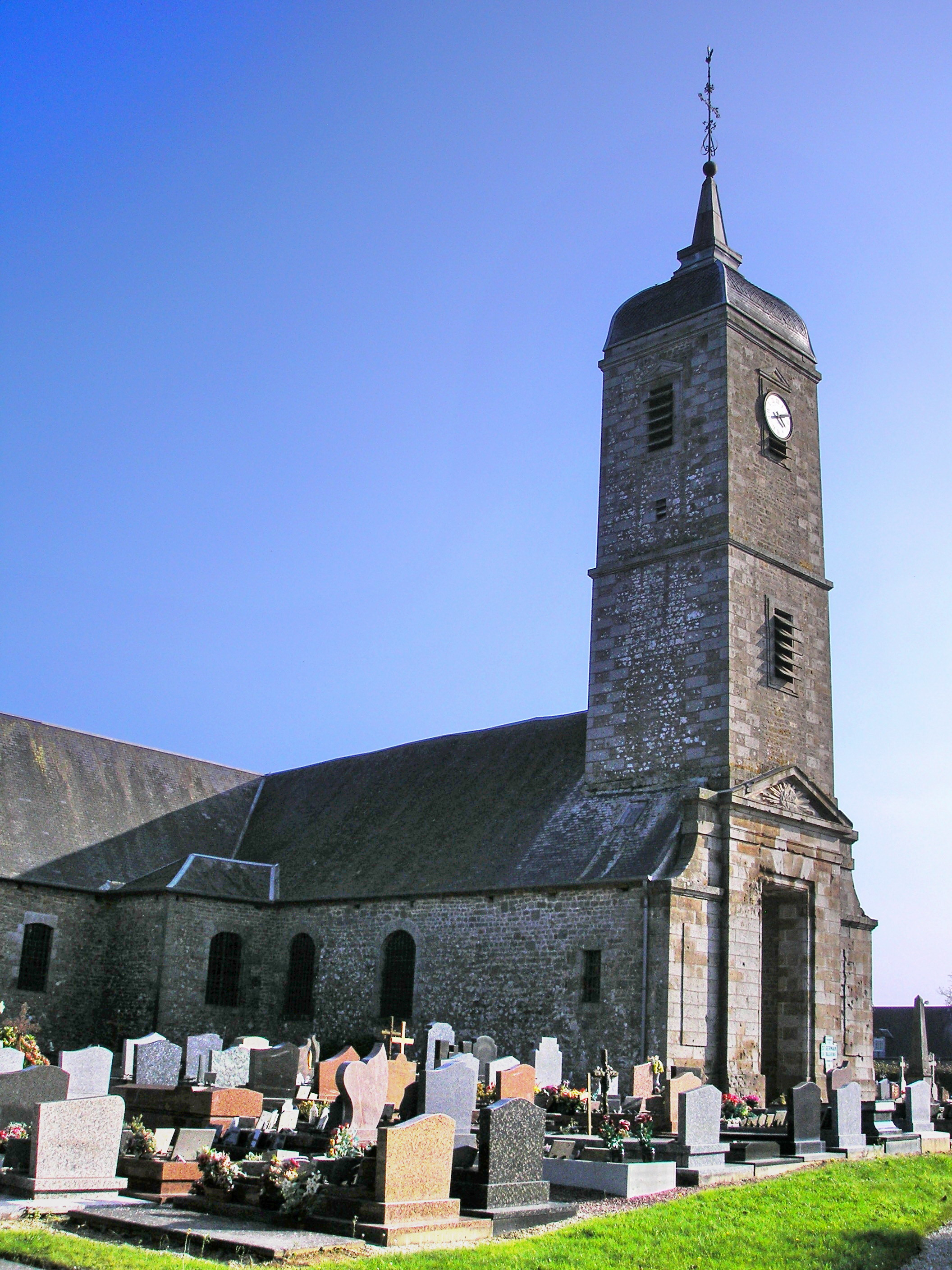 Saint-Germain-de-Tallevende-la-Lande-Vaumont (Normandie, France). L'église Saint-Germain (dans le bourg de Saint-Germain-de-Tallevende).